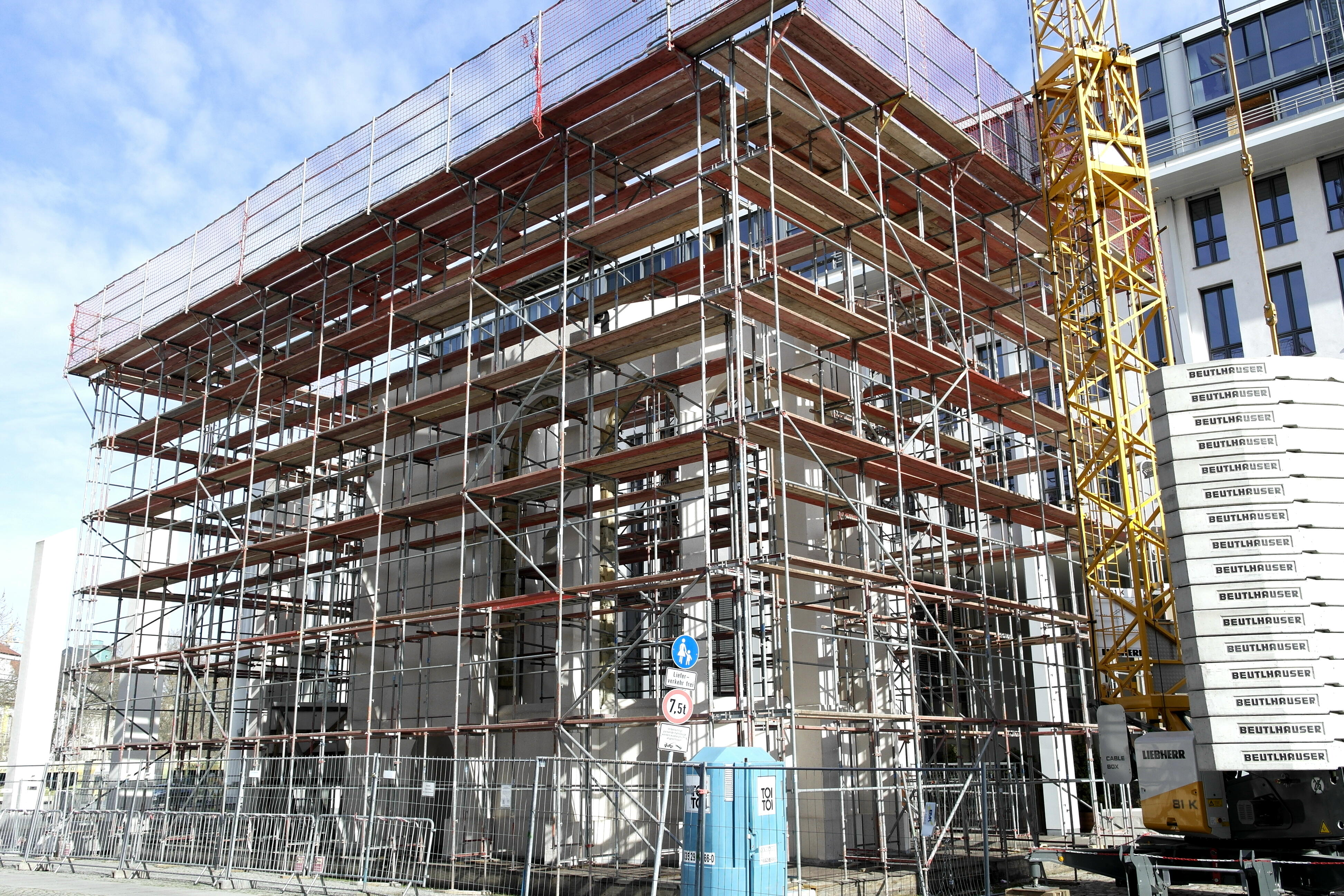 Gedenkstätte Busmannkapelle in Dresden 2015